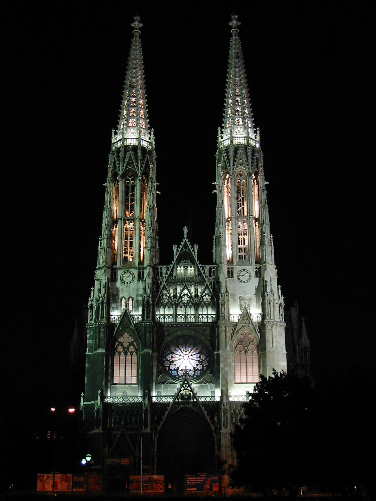 Votivkirche Wien bei Nacht